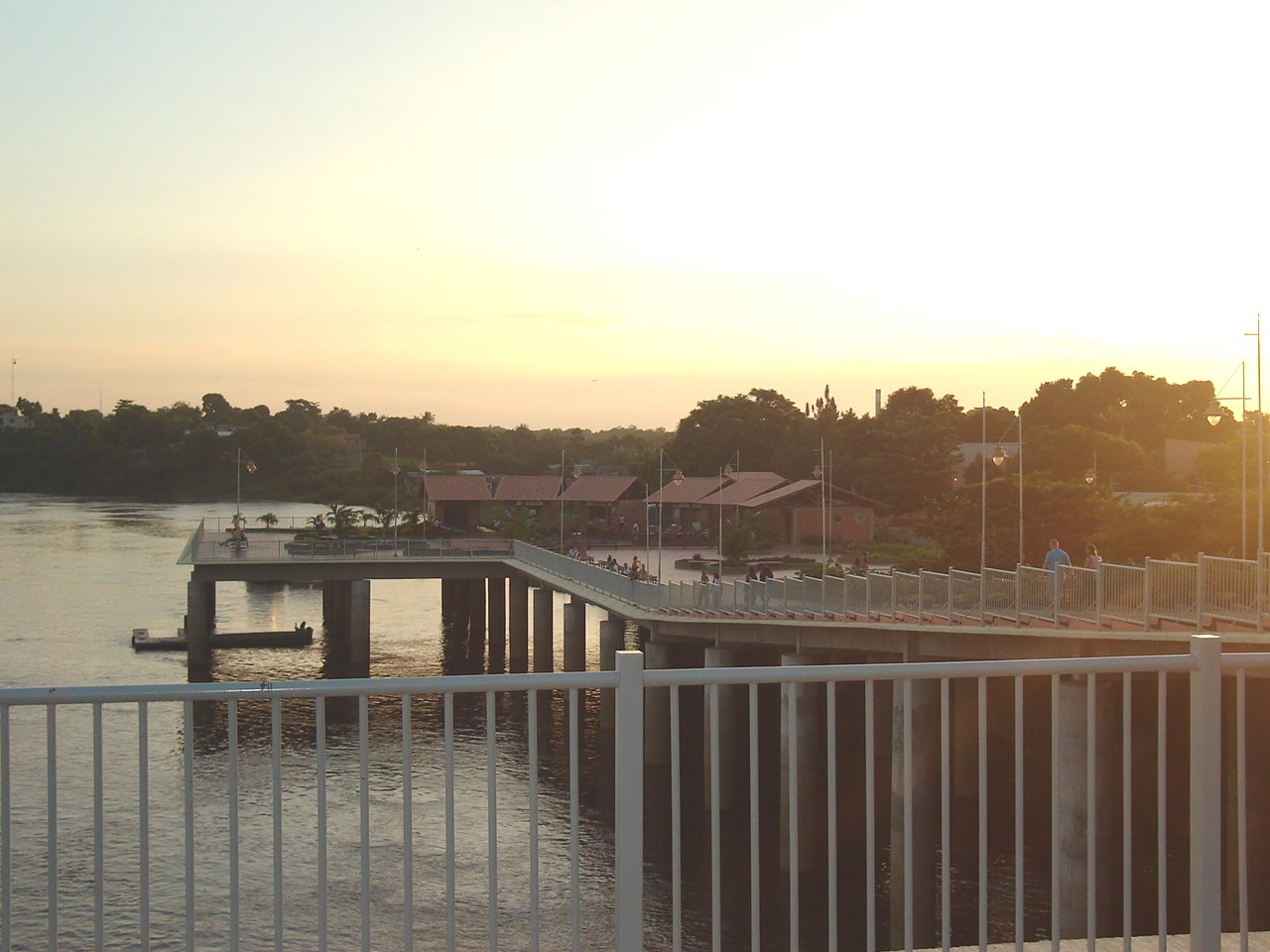 Orla Taumanan, ponto turístico de Boa Vista, Roraima. Todas para Boa Vista].